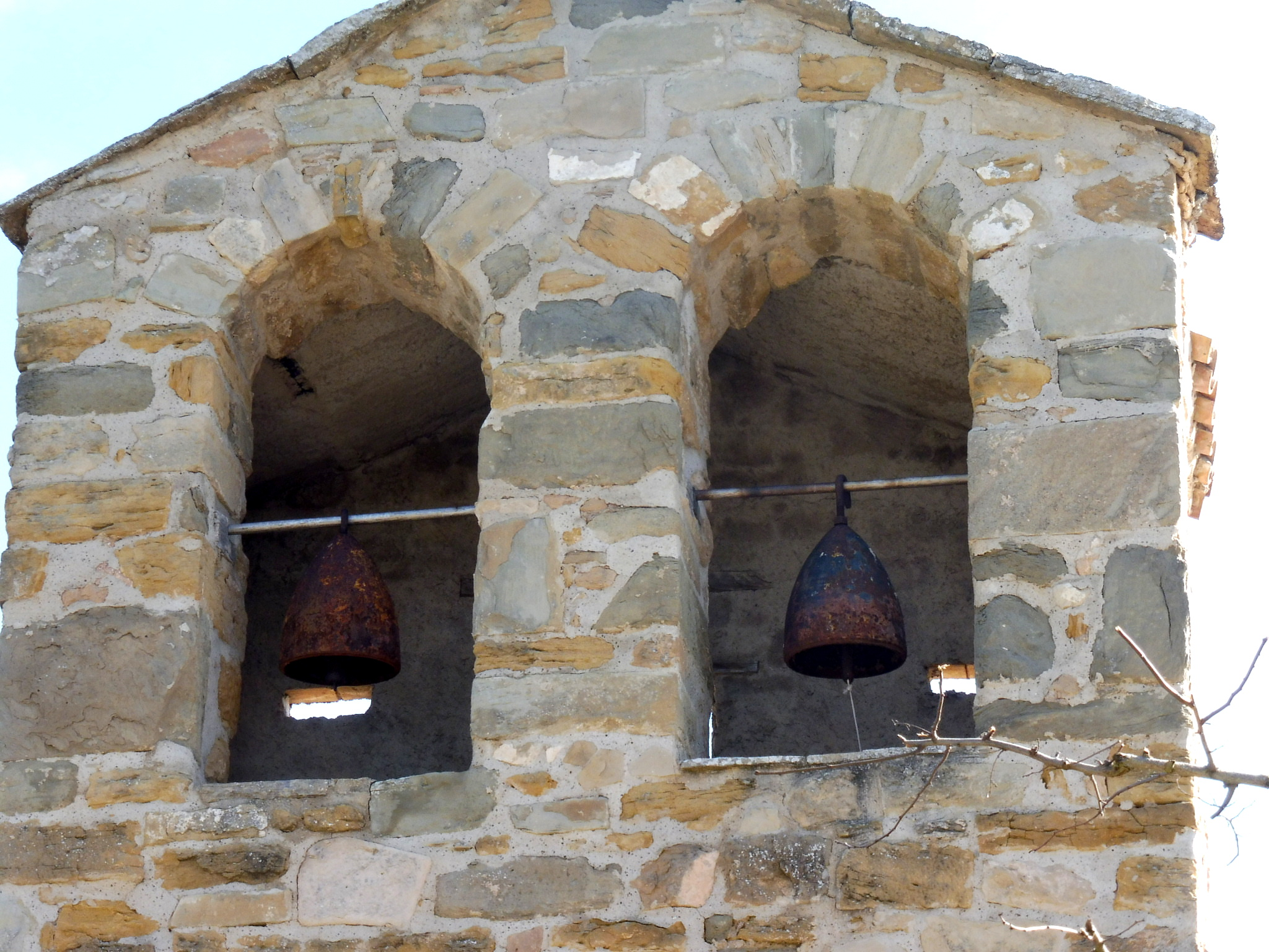 Església parroquial de Sant Salvador de Marcovau (Foradada): dos ogives d'obús fan la funció de campanes